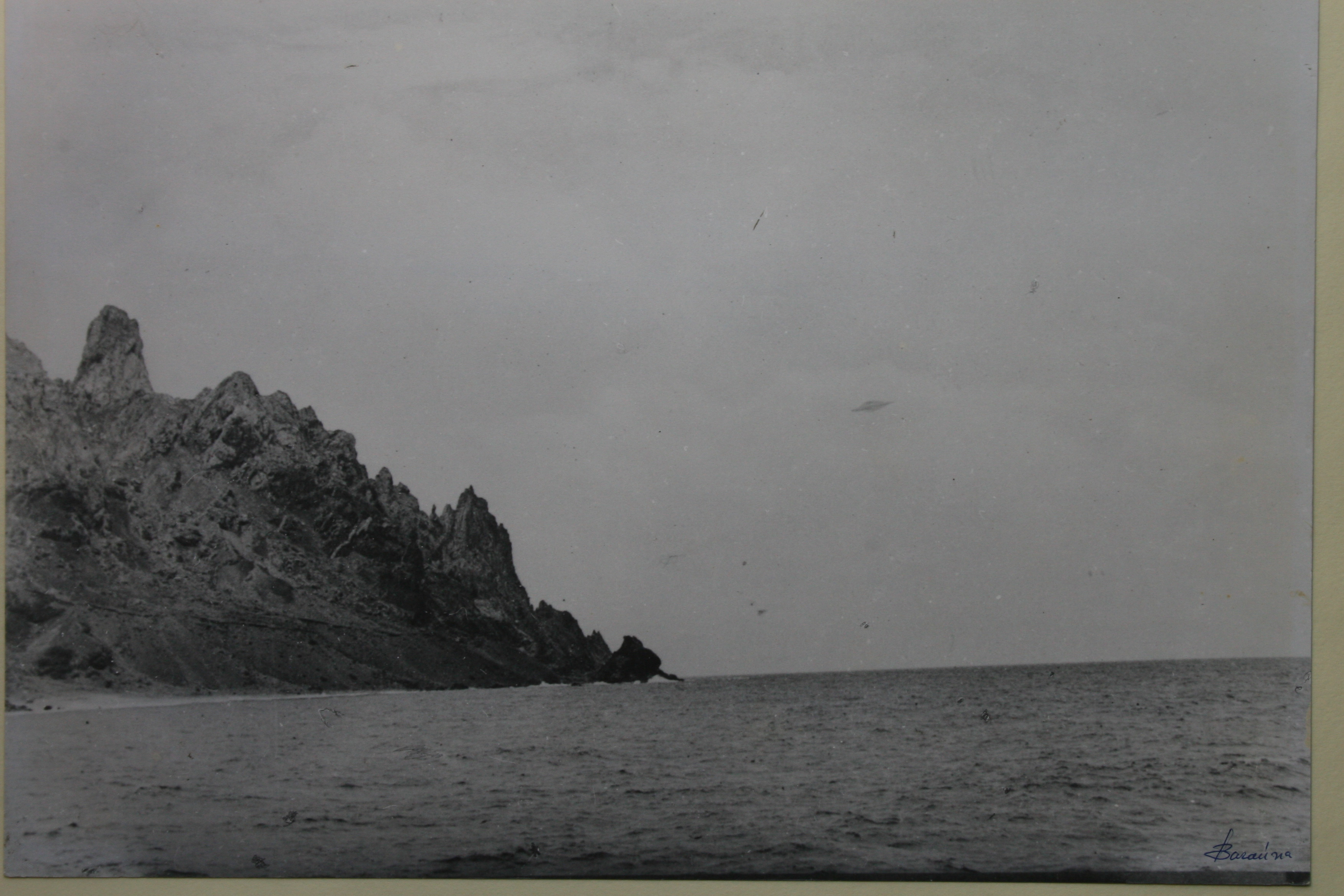 Fotografia de Almiro Baraúna de um suposto disco voador sobre a Ilha da Trindade